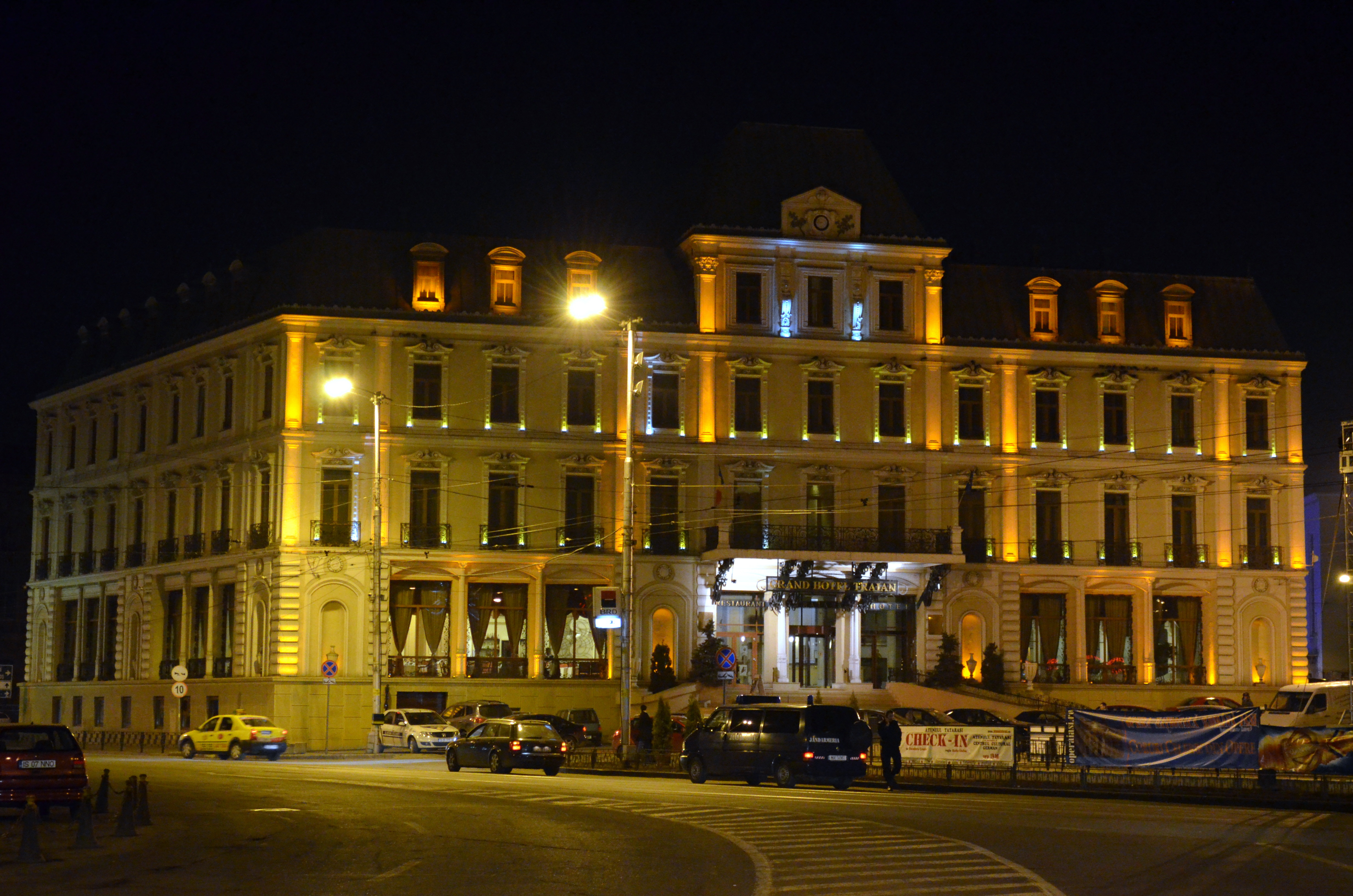 Grand Hotel Traian, Piața Unirii nr. 1, Iași